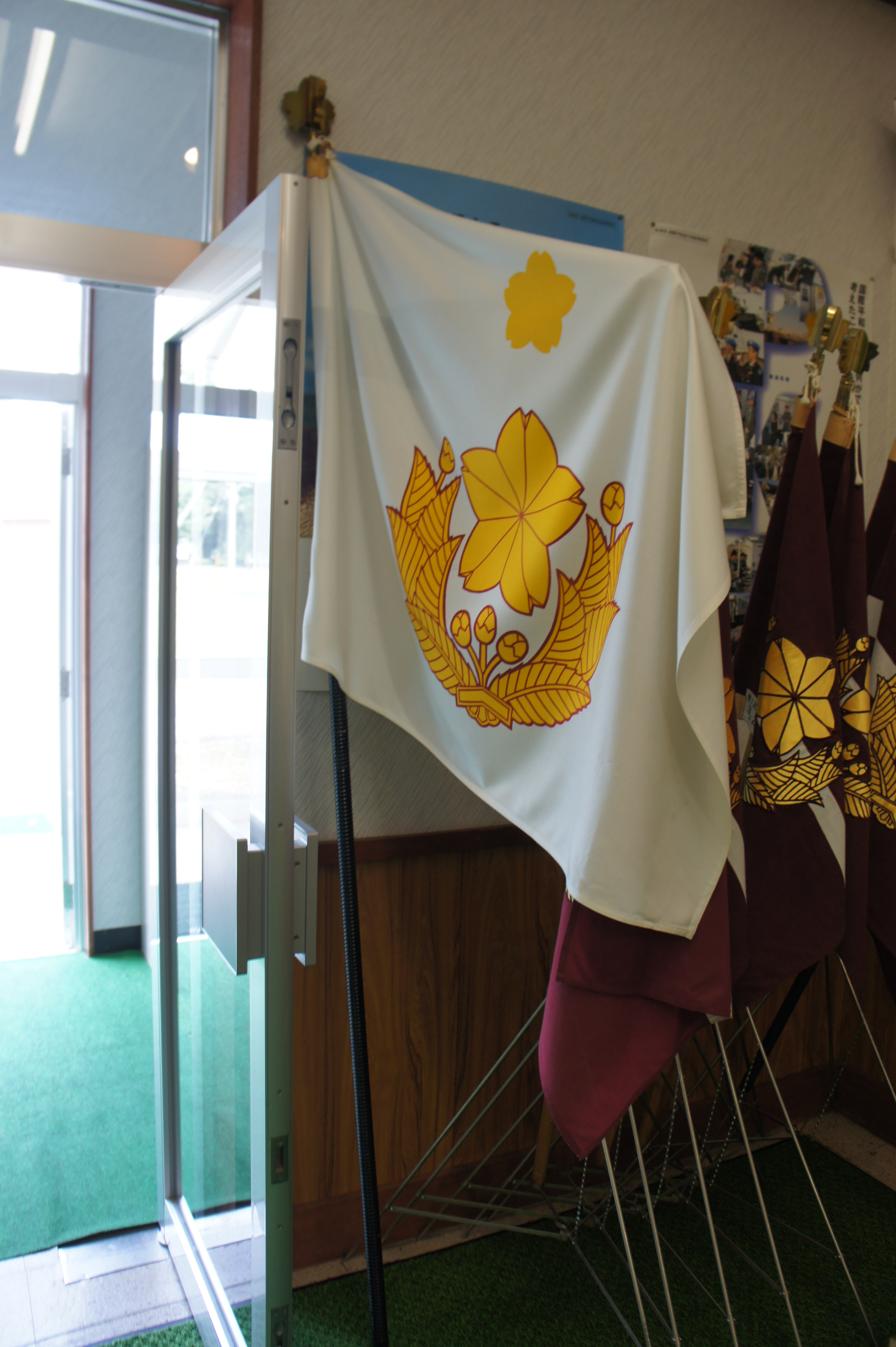 とある機会に恵まれて南恵庭駐屯地資料館見学の際に撮影した桜星1個の団旗です、担当者の話ではかつて団旗は桜星1個だったそうで、今でも入口にひっそりと飾っているとか。道内では他に北恵庭駐屯地の戦車団旗しか残存していないとか。主に陸将補若しくは1佐が団長として指定されていた団長の旗として使われていたそうです。担当者曰く現在では1佐の団長は旗の種類として群旗が使われているそうで、資料としての価値から保管されているそうです。